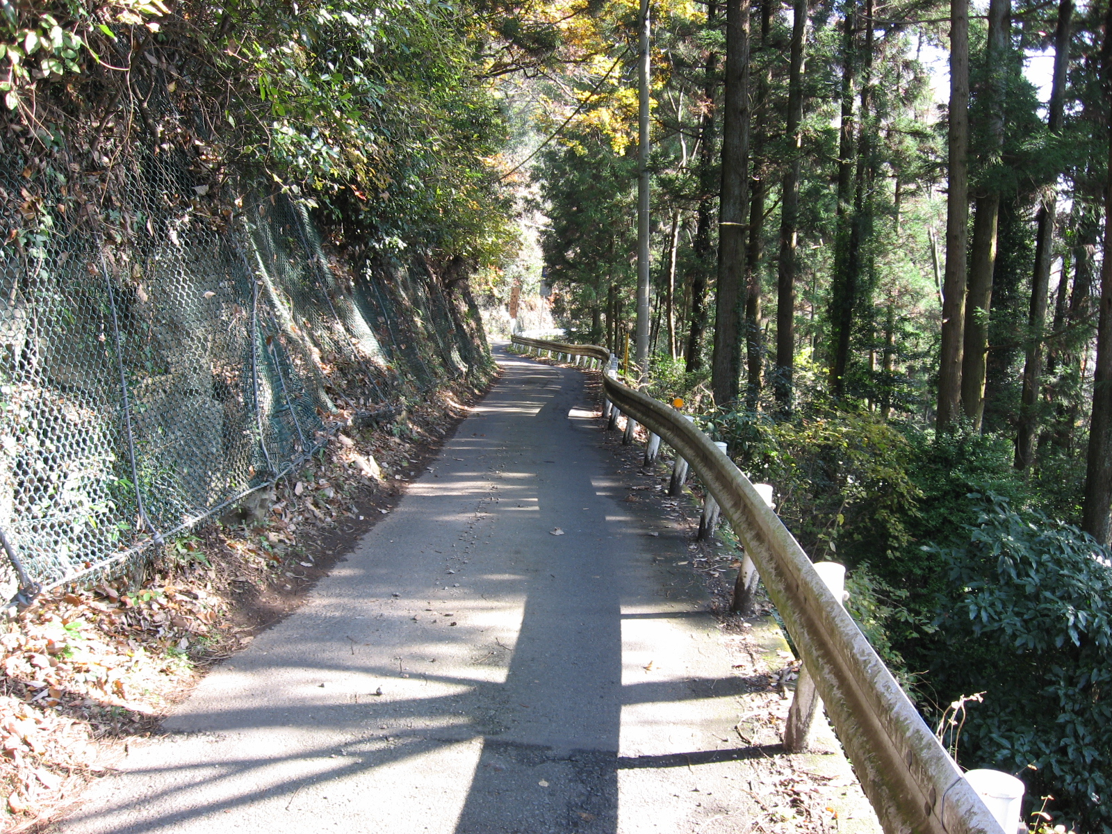 神奈川県道515号線